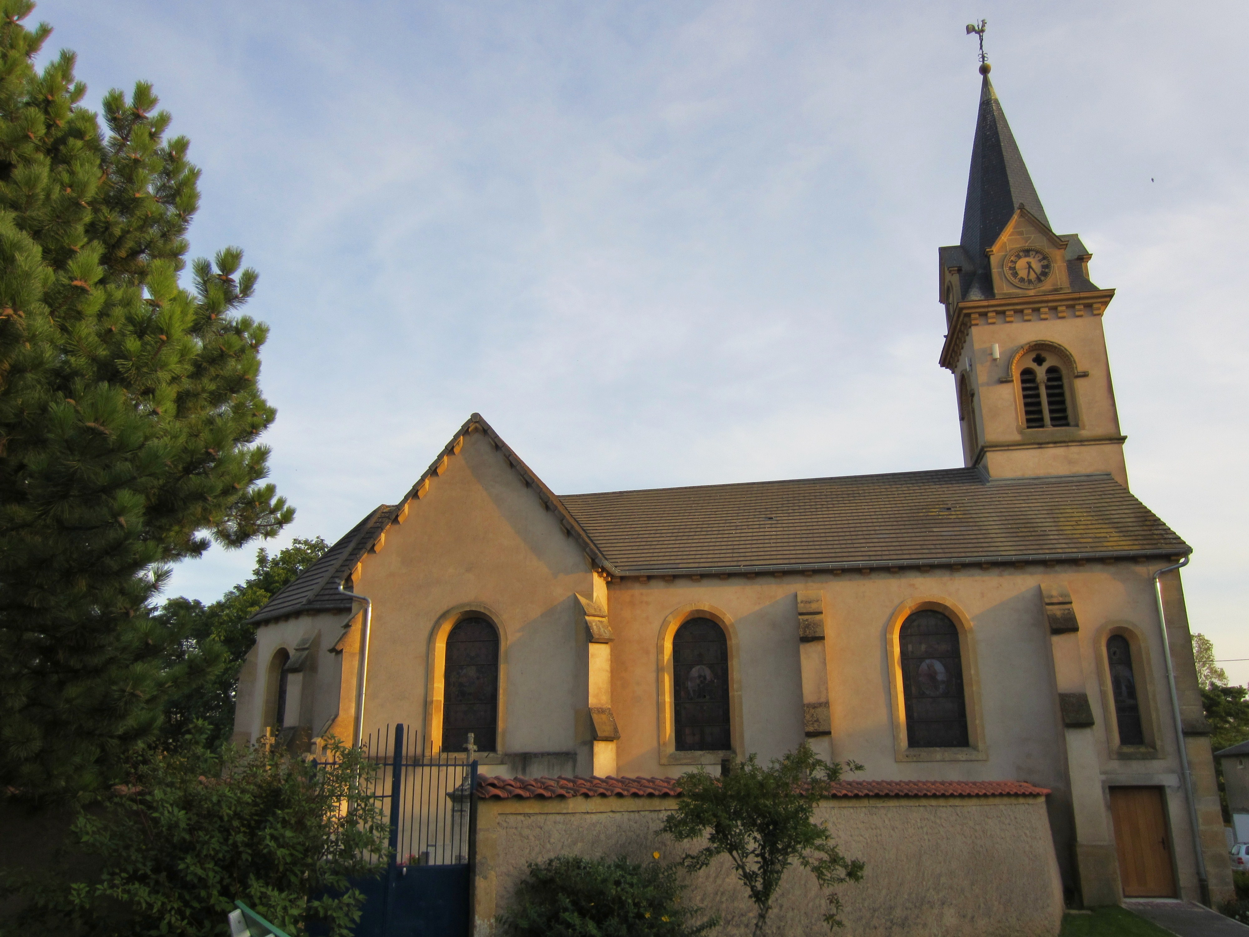 Description eglise Friauville eglise Friauville